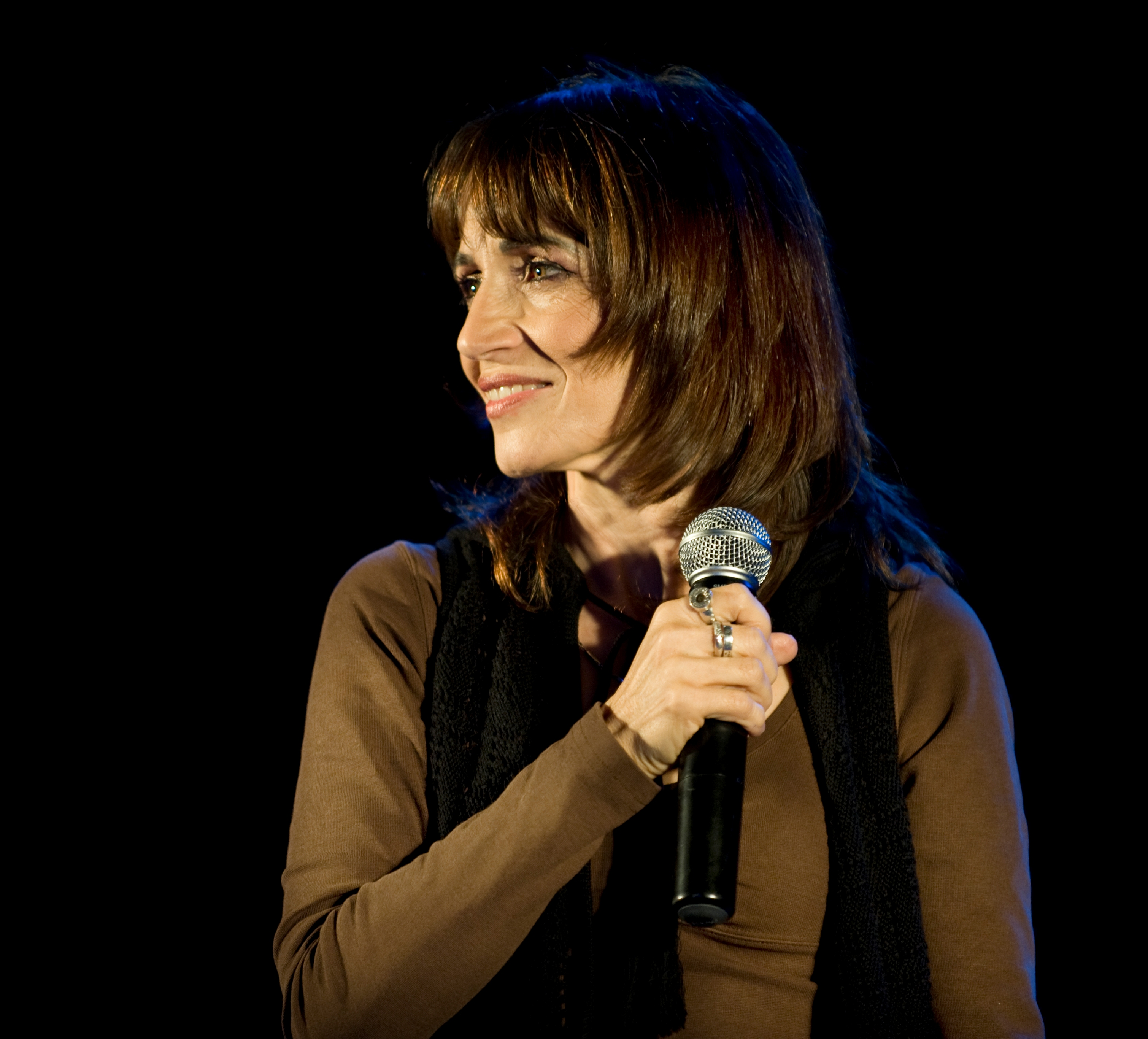 תמונתה של הזמרת רוחמה רז צולמה בידי: אופיר הראל